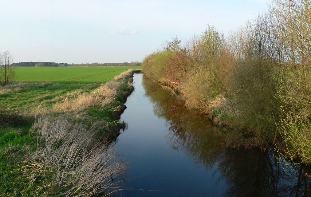 Ise bei Platendorf